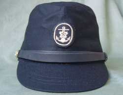 海上自衛隊 冬略帽